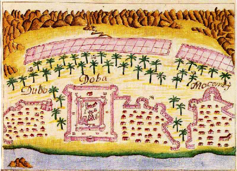 Forte de Doba, sultanato de Omã. In: RUBIM, Nuno Varela; CARITA, Rui. "O Lyvro de Plantaforma das Fortalezas da Índia, na Fortaleza de S. Julião da Barra, com 22 plantas de anónimo (I Manuel Godinho de Erédia, de cerca de 1620), e 55 plantas de anónimo (II de cerca de 1640)".